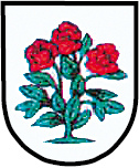 Herb Łubków (gmina Zbrosławice, powiat tarnogórski, województwo śląskie, Polska)